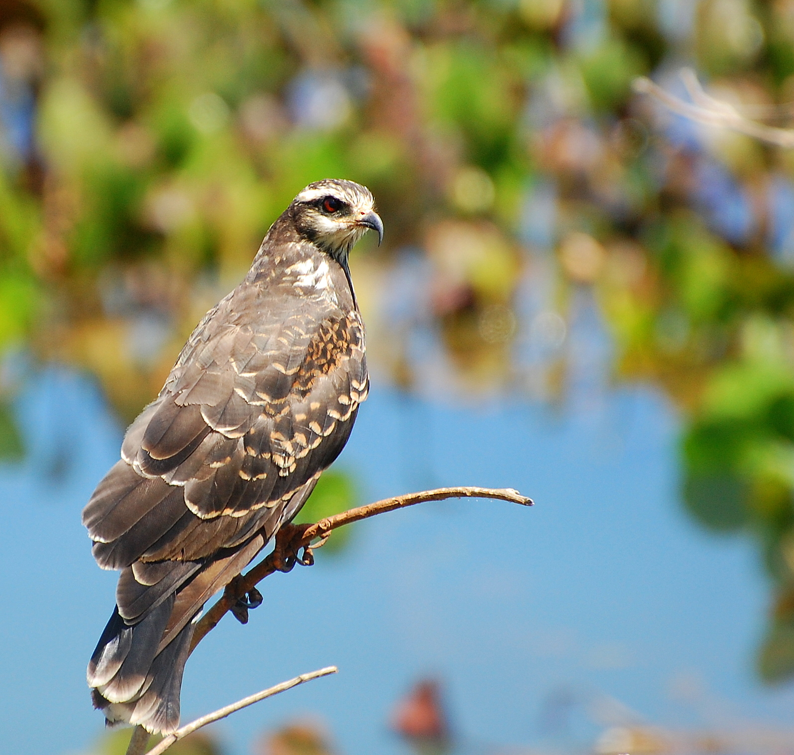 Margem do rio Paranapanema em Piraju-SP